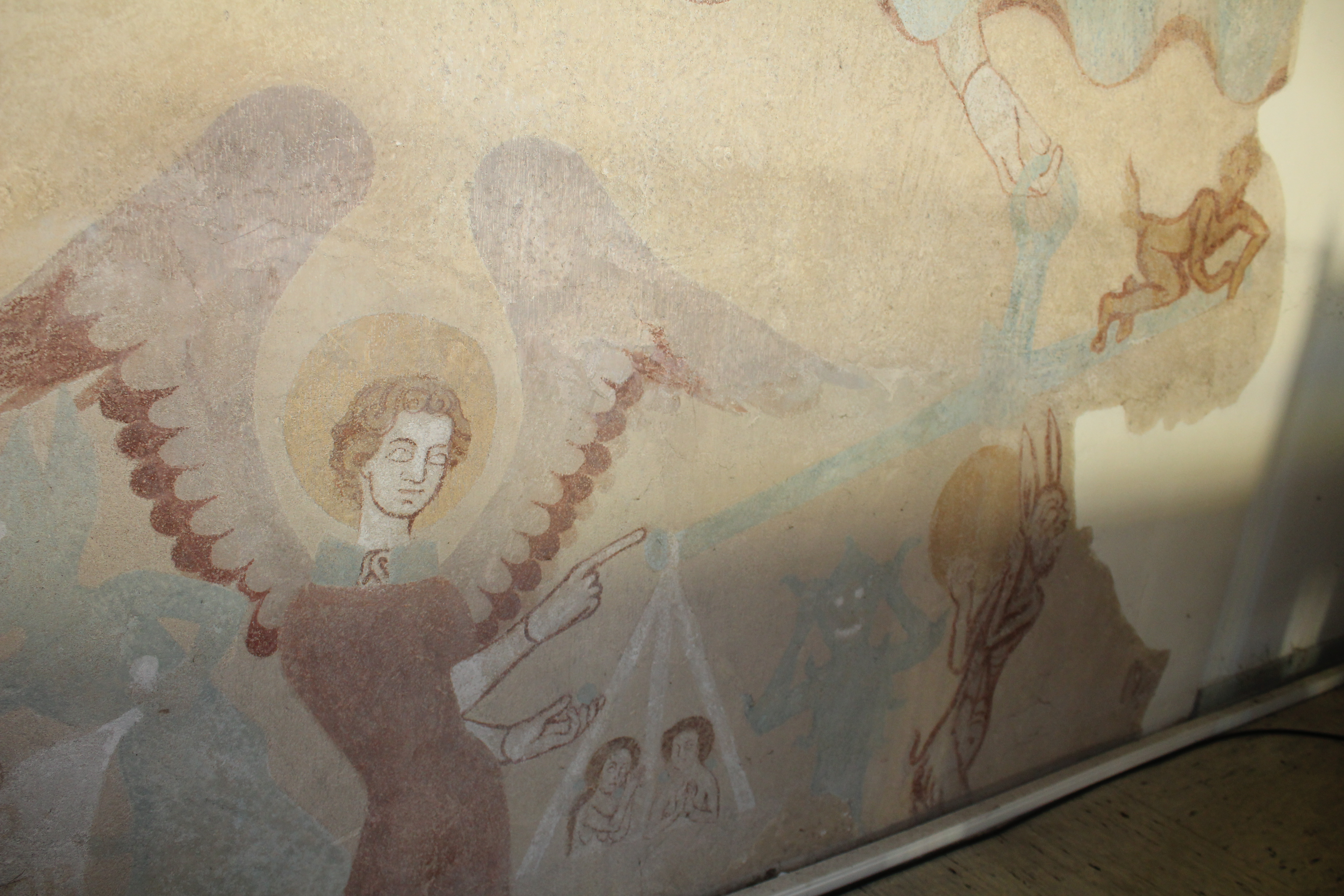 Fresken in der Evangelischen Kirche Ostheim (Nidderau), Main-Kinzig-Kreis, Hessen, Deutschland